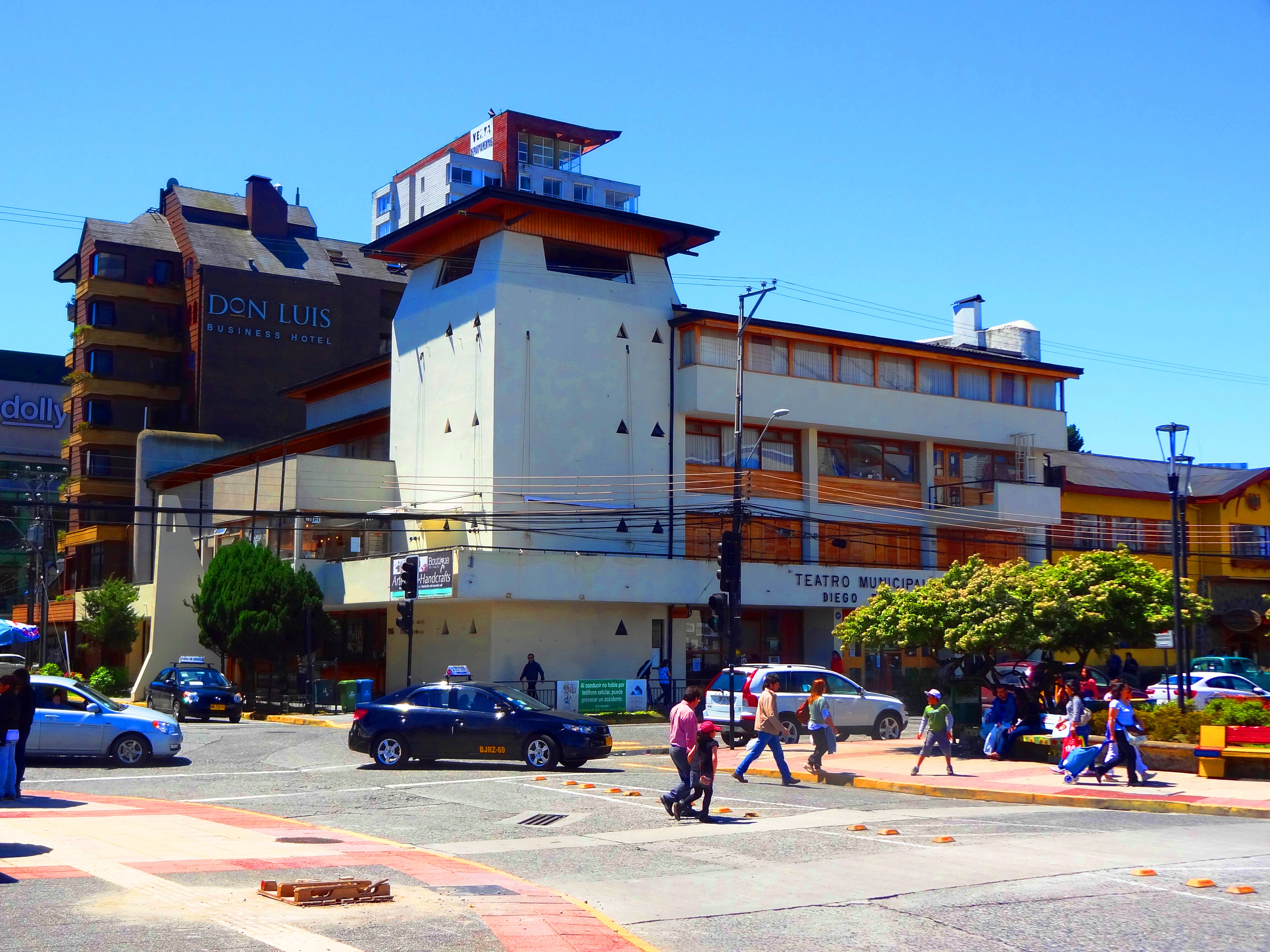 El café en el edificio Diego Rivera. Este hermoso edificio con arquitectura típica fue donado por la República de los Estados Unidos de México cuando la ciudad fue destruida por un violento terremoto.